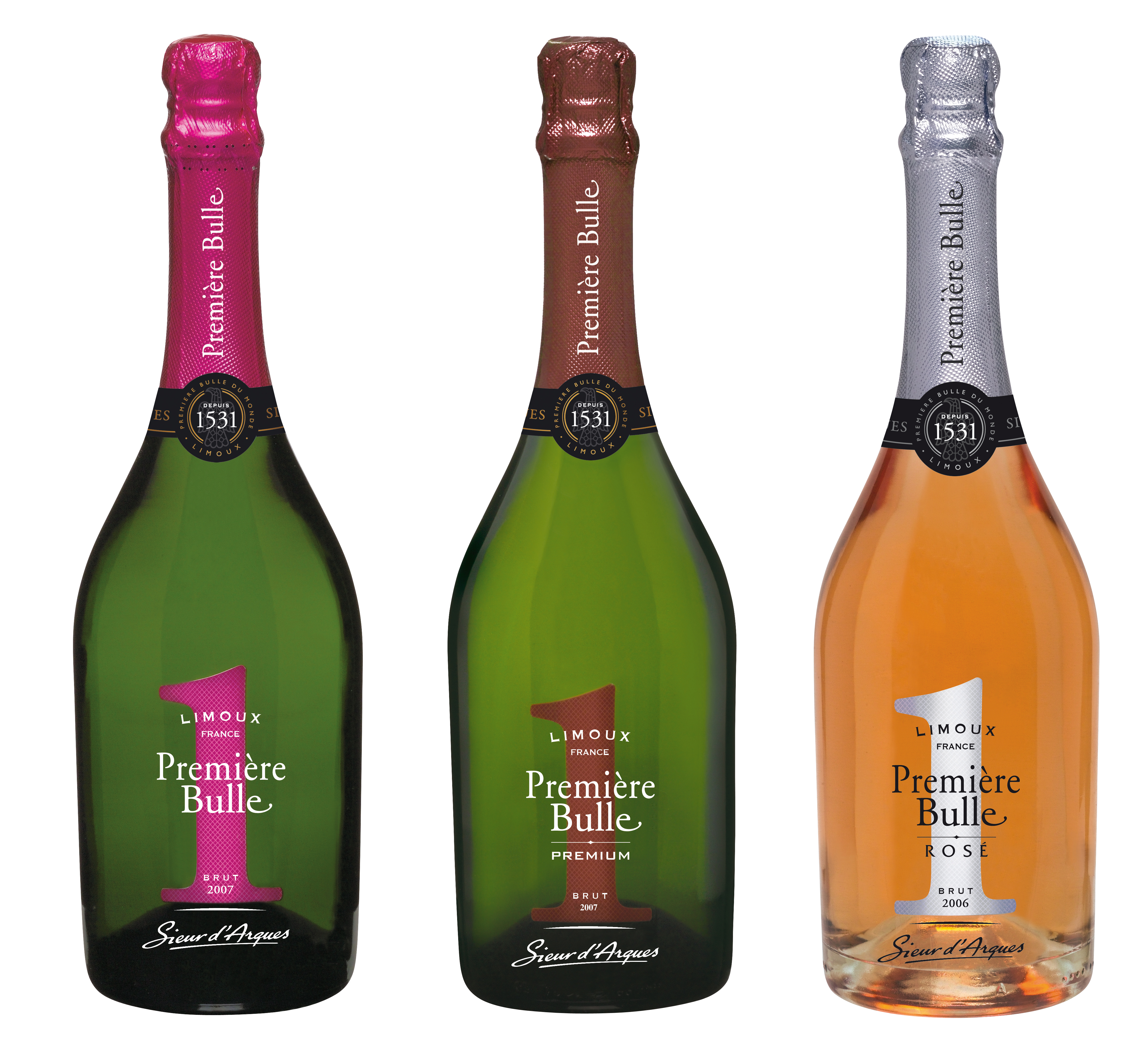 Gamme Première Bulle (Première Bulle, Première Bulle Premium, Première Bulle Rosé)